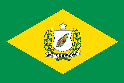 Bandeira do Município de Cedro - Pernambuco, Brazil. ; Flag of Cedro city, state of Pernambuco, Brazil